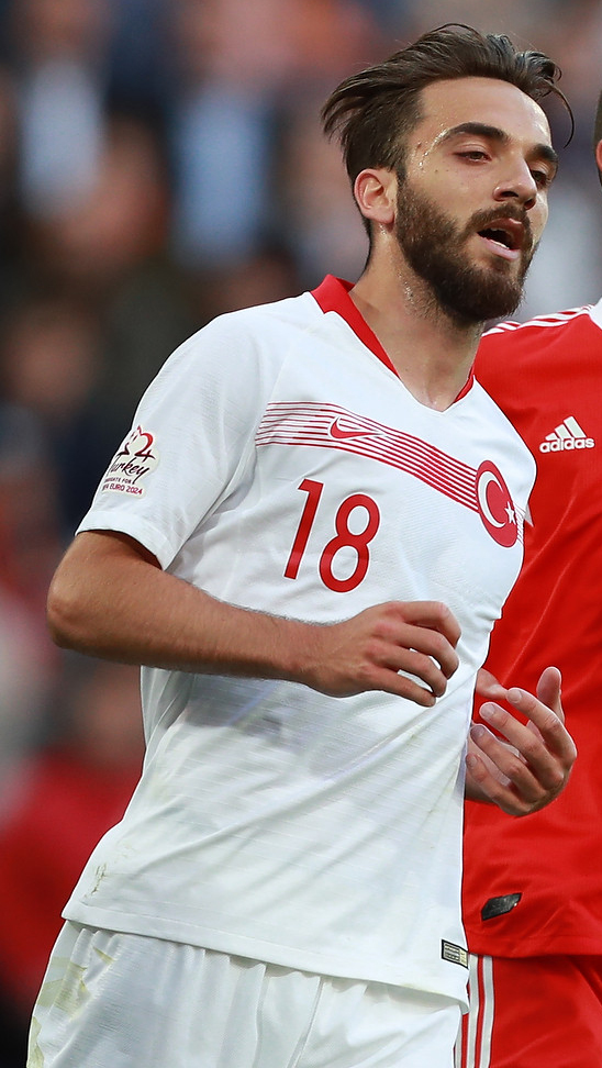 Россия при невыразительной игре расписала мировую с Турцией